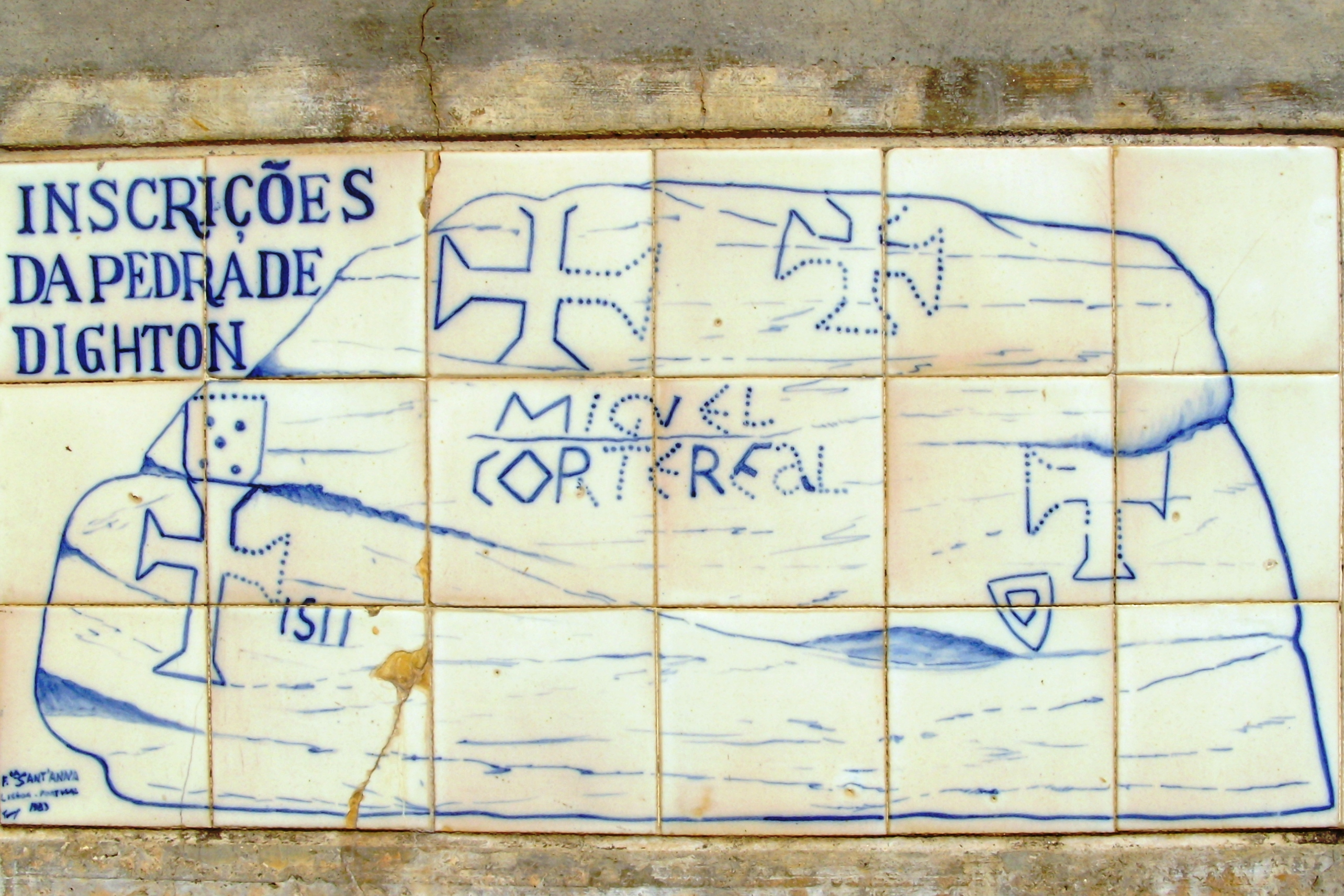 Interpretação da inscrição na Pedra de Dighton: detalhe da réplica exposta no Museu da Marinha, Lisboa, Portugal.